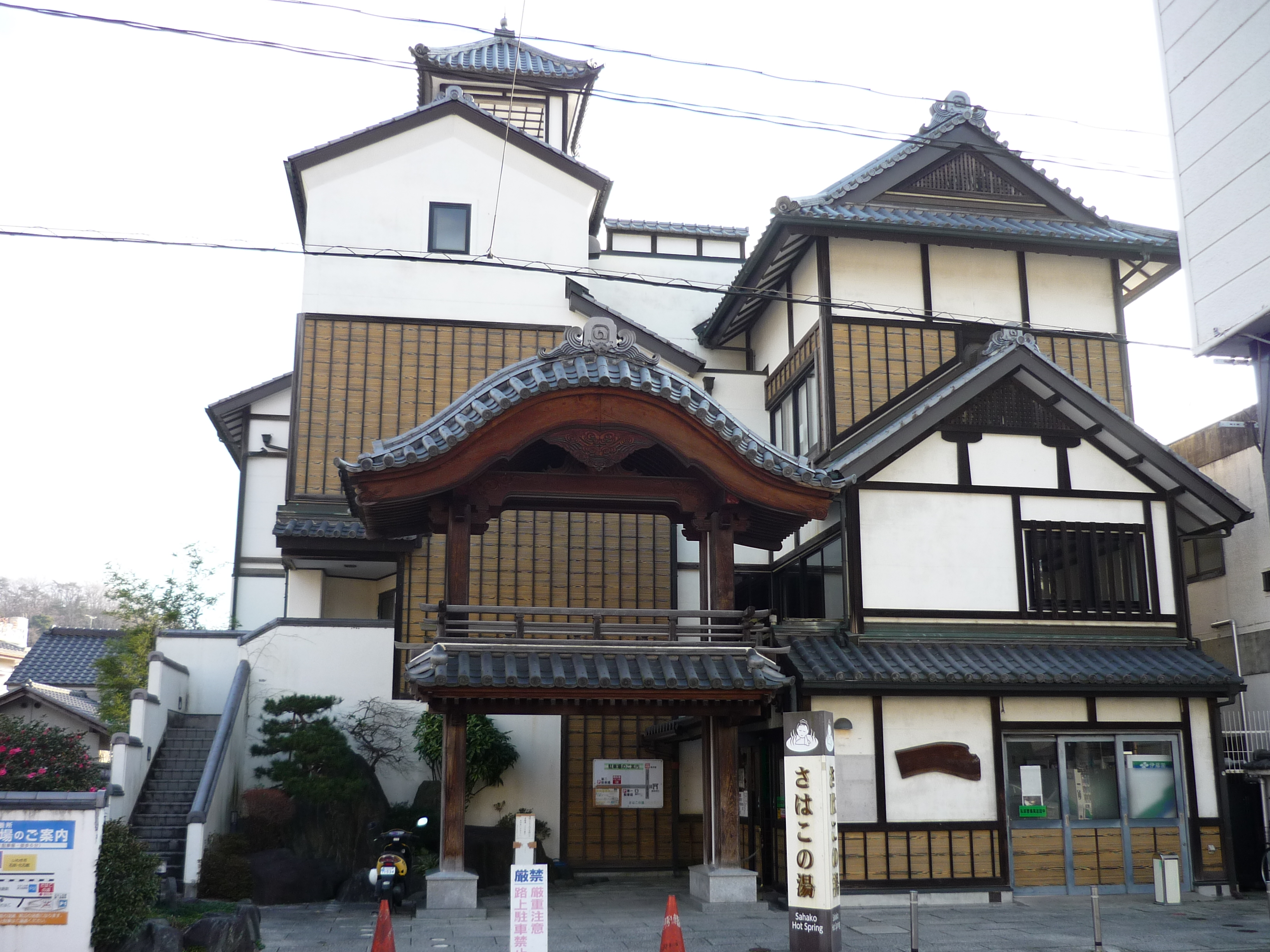 いわき湯本温泉・さはこの湯（2017年1月撮影）